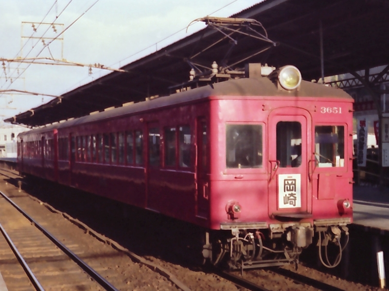 名鉄モ3651号 撮影地：知立